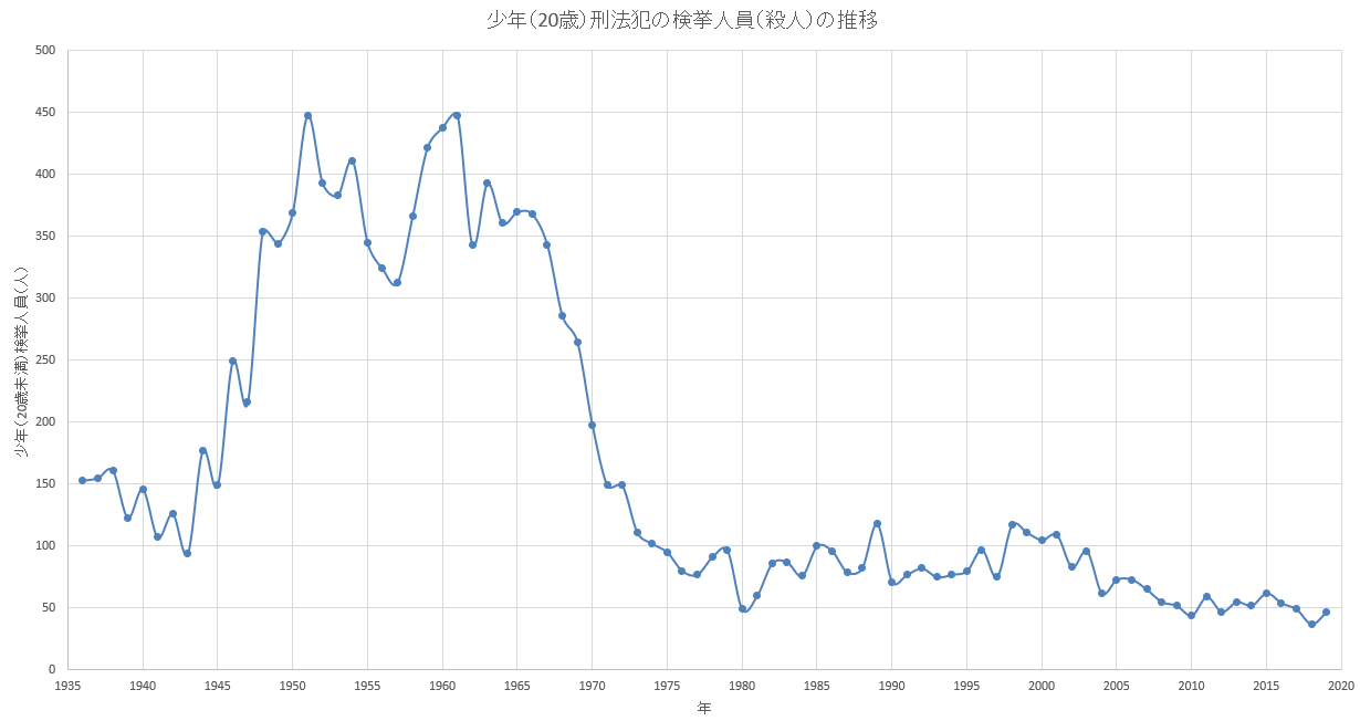 平成30年版犯罪白書の資料3－3 少年による刑法犯 検挙人員（罪名別）の資料を基に1946年～2017年の殺人の検挙人員